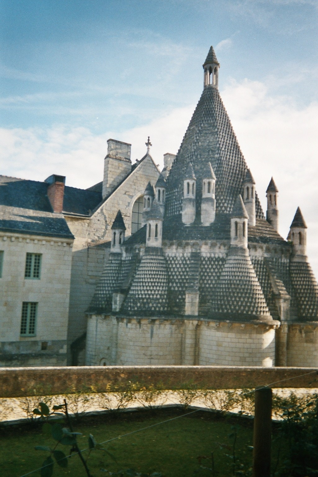 Clochetons En Pierre Abbaye De Fontevraud 40km à l'ouest de Tours France 041126 (GFDL) Photo prise par melusin le 041121 propriétaire des négatifs.